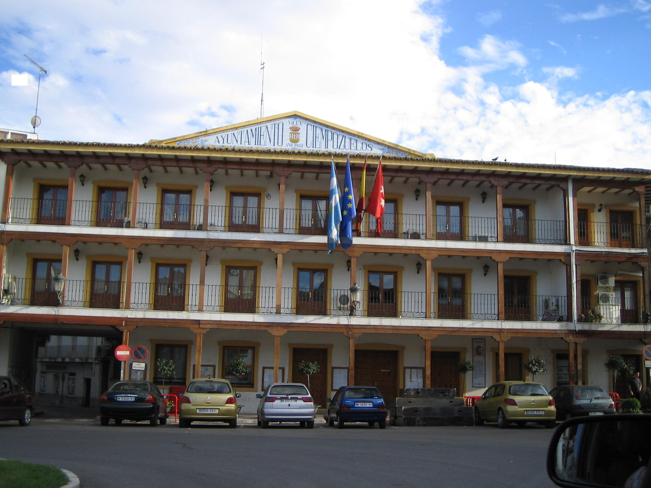 Ayuntamiento de la localidad de Ciempozuelos en España